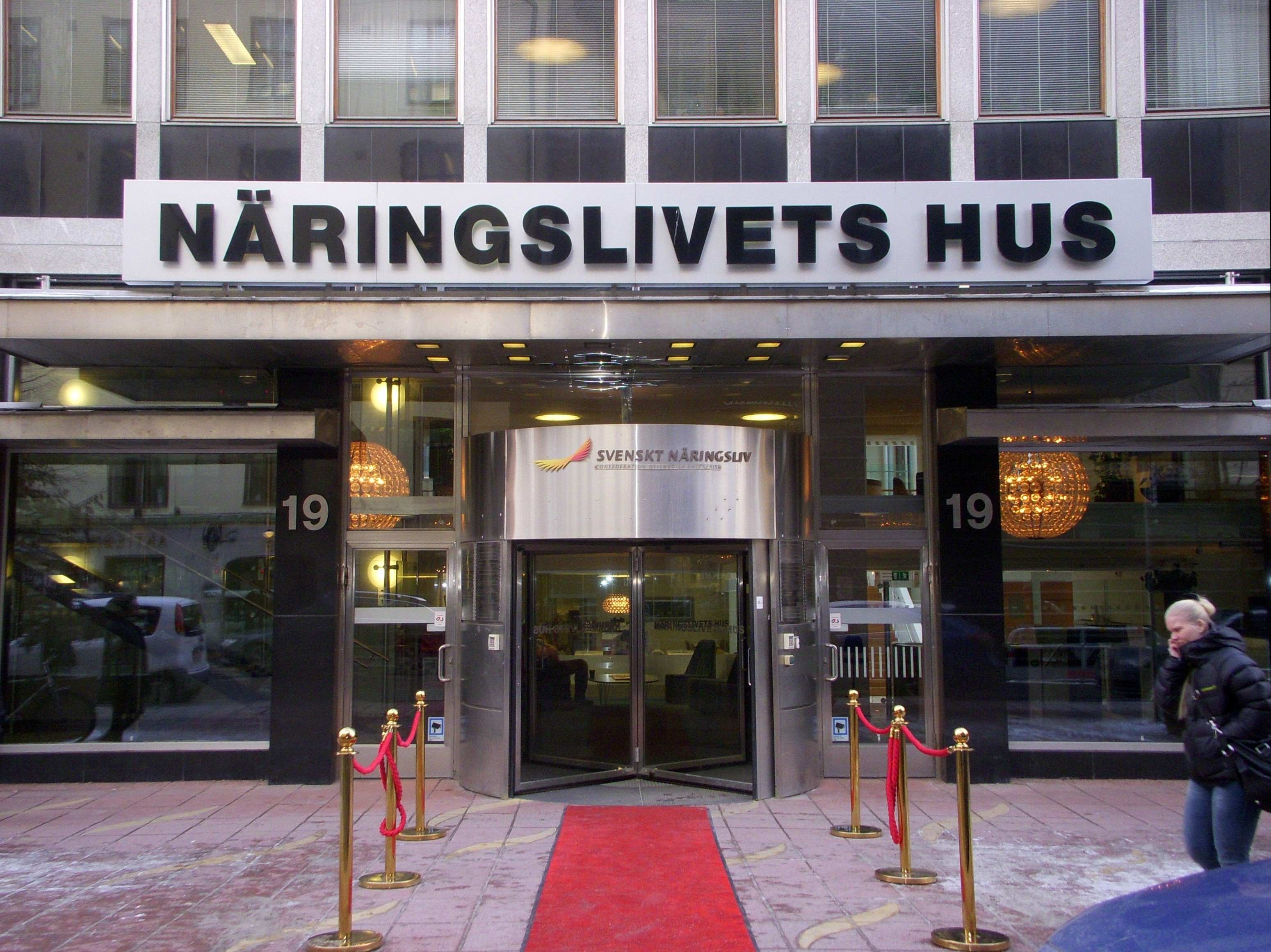 Svenskt Näringsliv, Storgatan Stockholm, entré